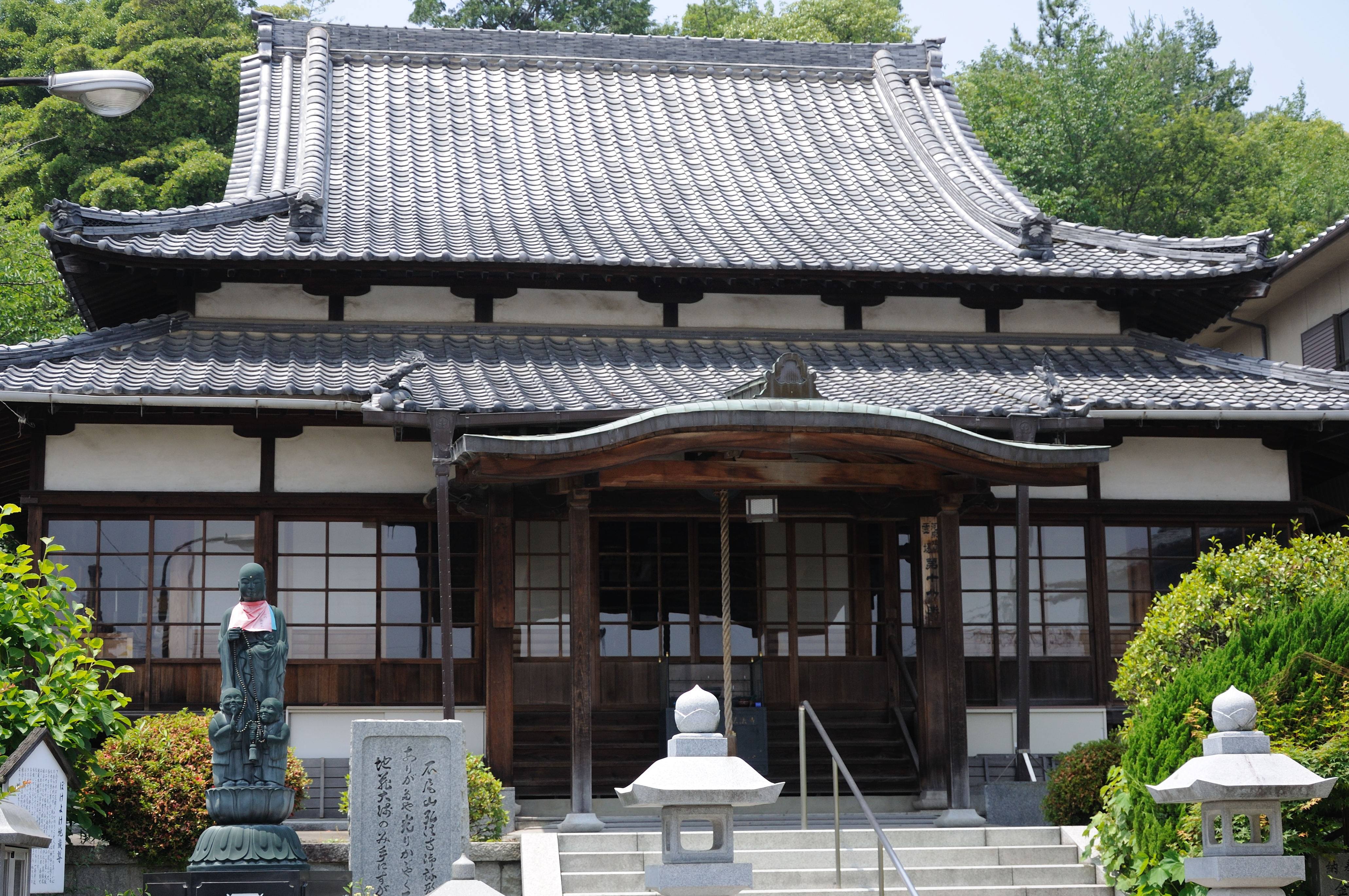 万町弘法寺本堂（大阪府和泉市）